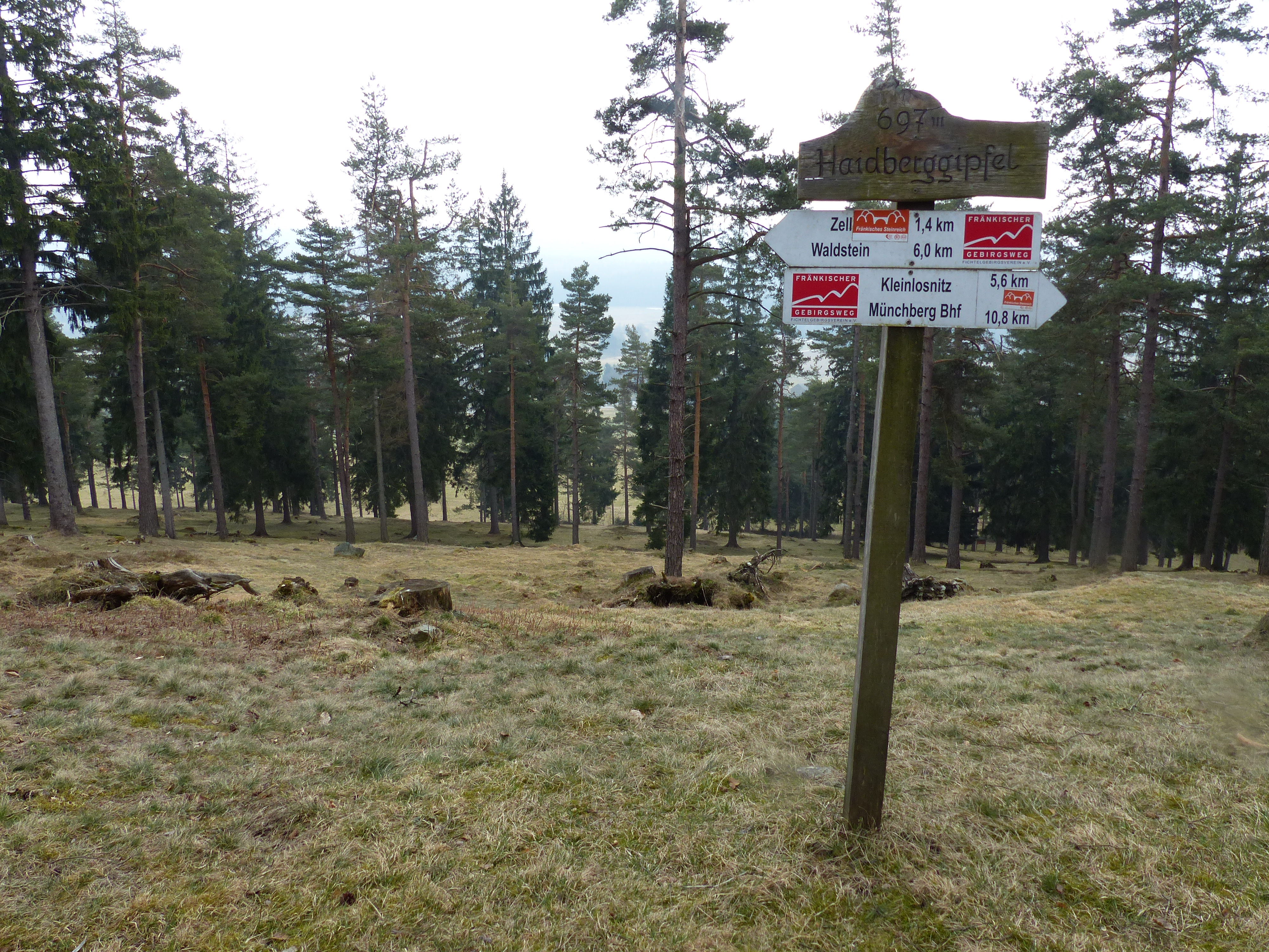 Haidberg bei Zell im Fichtelgebirge, Geotop und Berg